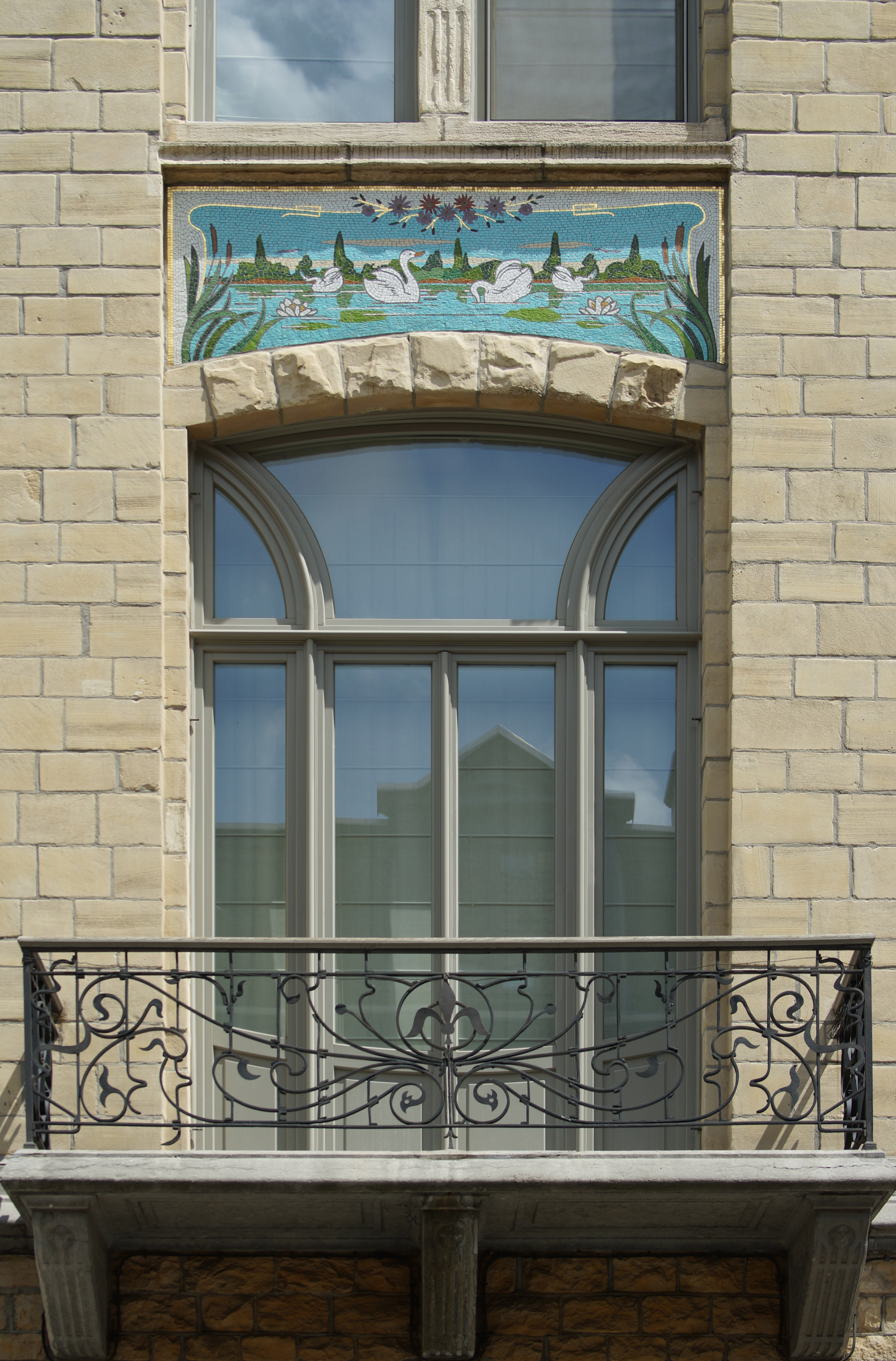 Oeuvre van architect Jozef Baeckelmans